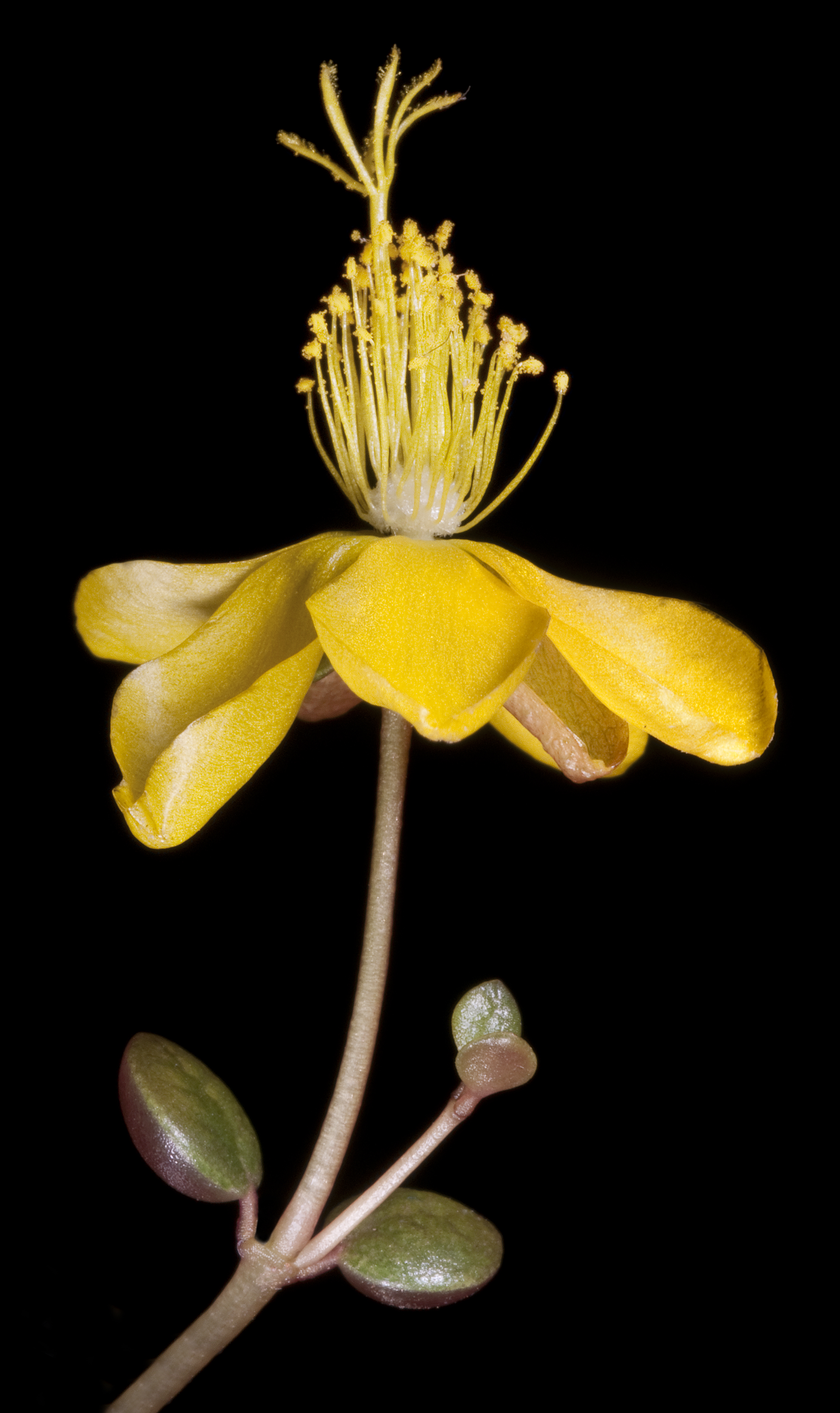 cult (K Knight)